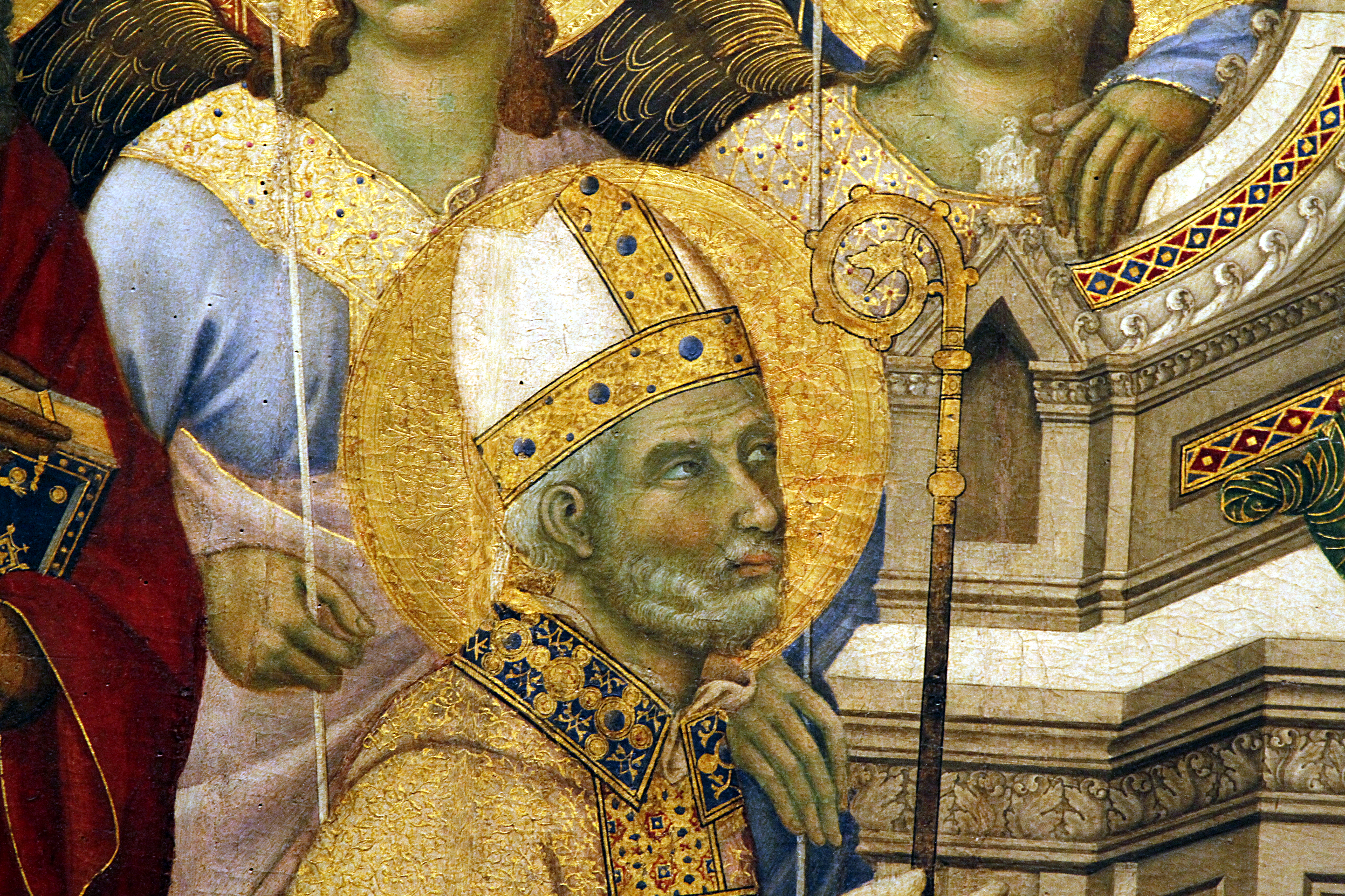 Maestà - Museo dell'Opera del Duomo - Siena